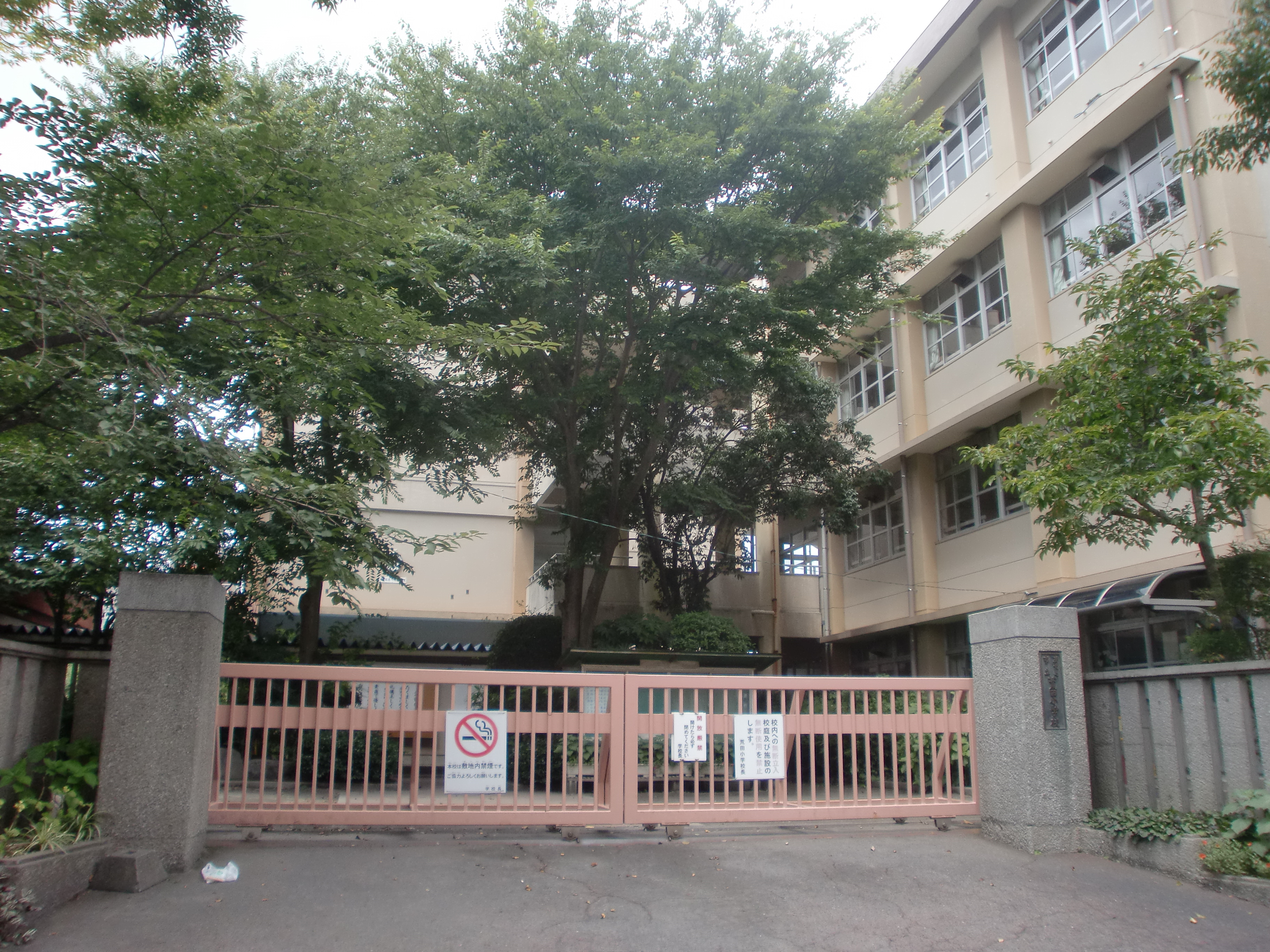 鹿児島市立荒田小学校の外観